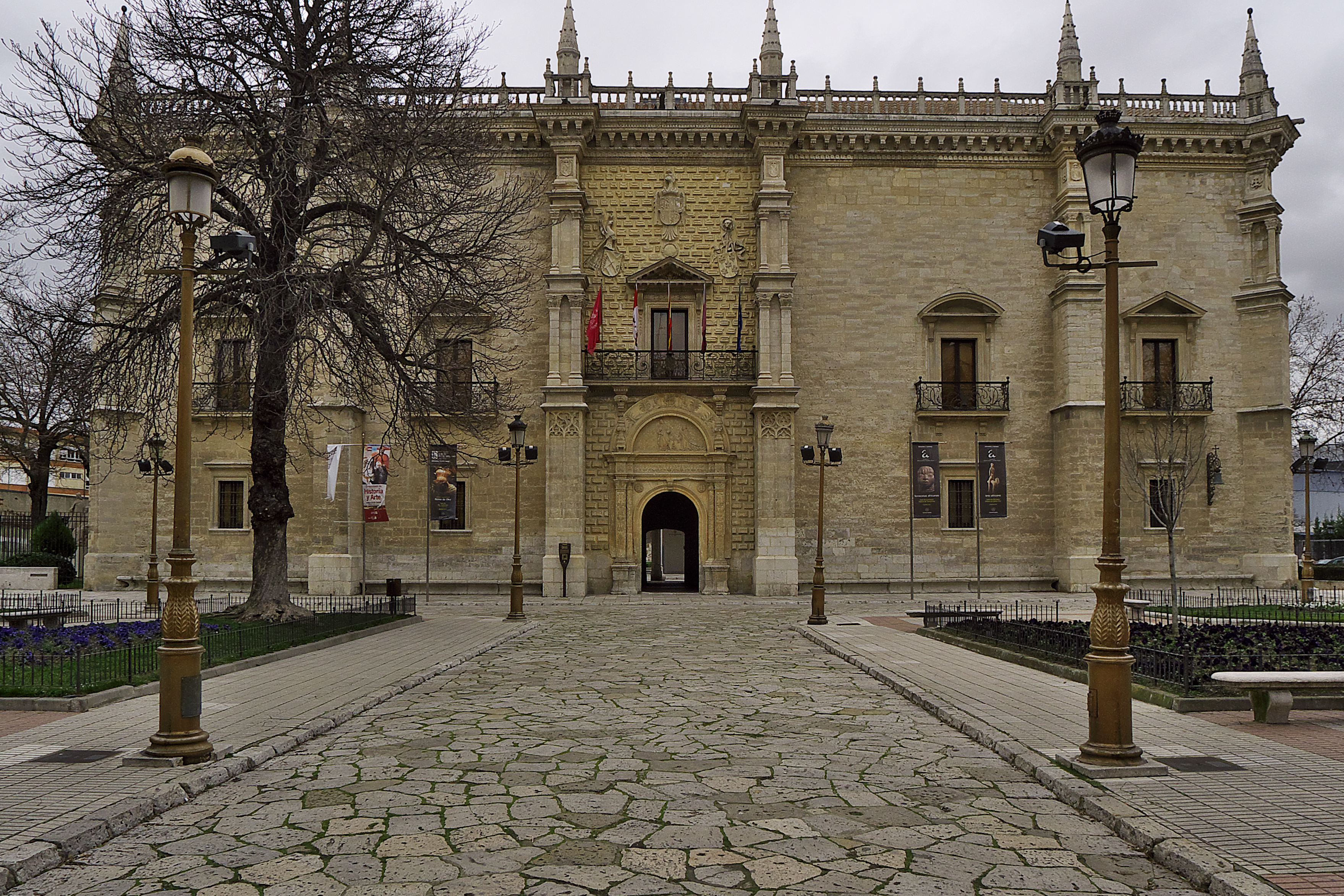 El cardenal Gil Álvarez de Albornoz funda el Real Colegio de España, Bolonia (1364-1369). Será el comienzo del mecenazgo de la cultura por los grandes prelados, así, el obispo Diego de Anaya Maldonado y el Colegio Mayor de San Bartolomé, Salamanca (1401); Pedro González de Mendoza (cardenal), Colegio Mayor de Santa Cruz, Valladolid (1486-1492); cardenal Francisco Jiménez de Cisneros, Colegio Mayor de San Ildefonso, Alcalá de Henares (1499); arzobispo Alonso de Fonseca y Ulloa, Colegio Mayor de Santiago el Zebedeo, Salamanca (1519) y el Colegio Mayor de Santiago Alfeo, Santiago de Compostela (1526), o el obispo Rodrigo Mercado de Zuazola con la Universidad de Oñate, Oñate (1540).